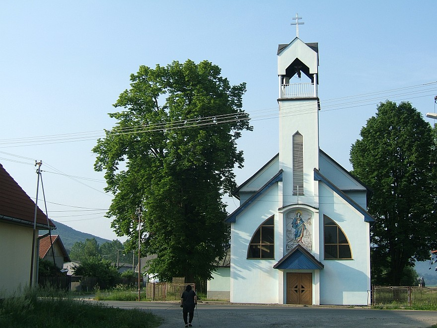 Dúbravy - kostol